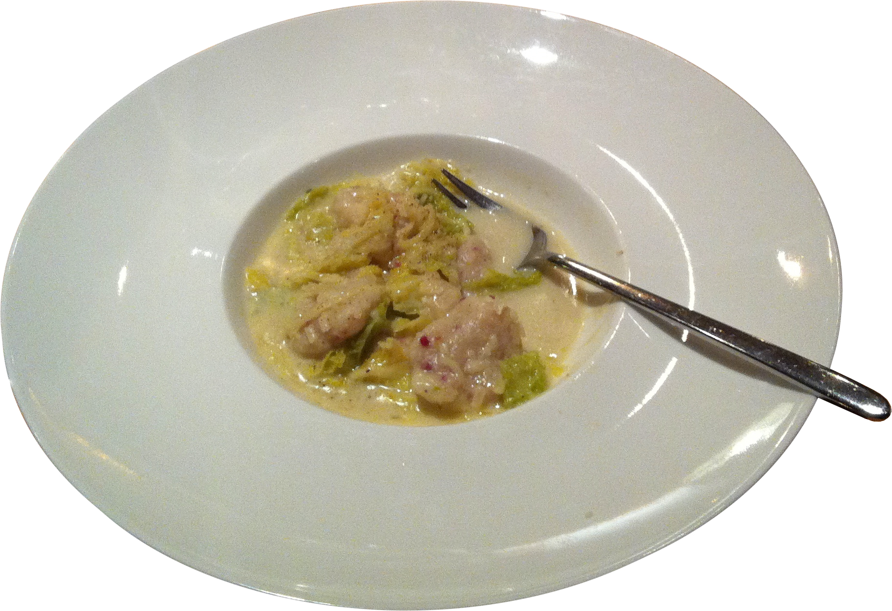 Pizokel, eine Teigwarenspezialität aus dem Kanton Graubünden